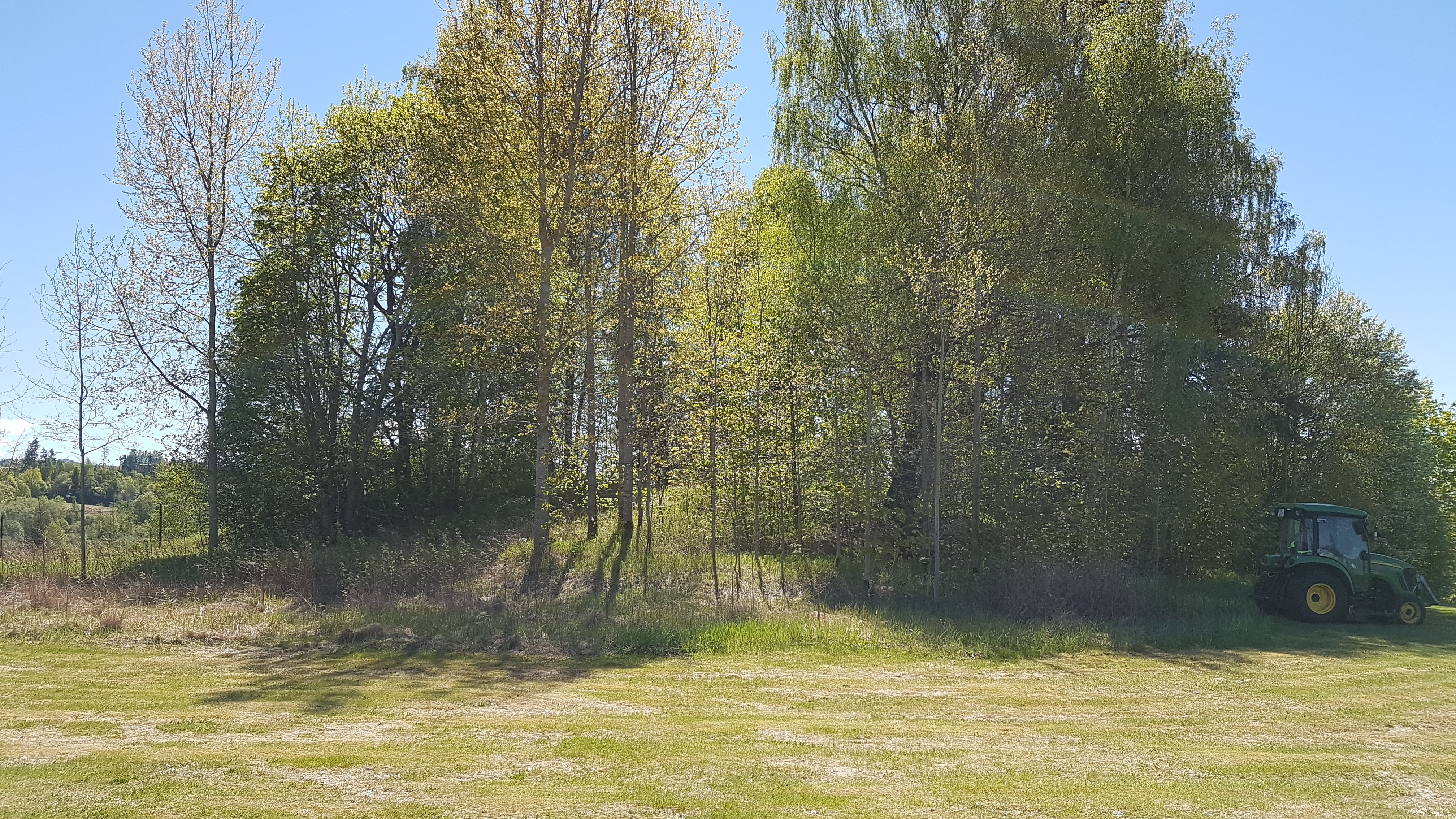 Kongshaugen er fra jernalderen og ligger omkring 170 meter sør for Hønen gård i Hønefoss, Ringerike kommune